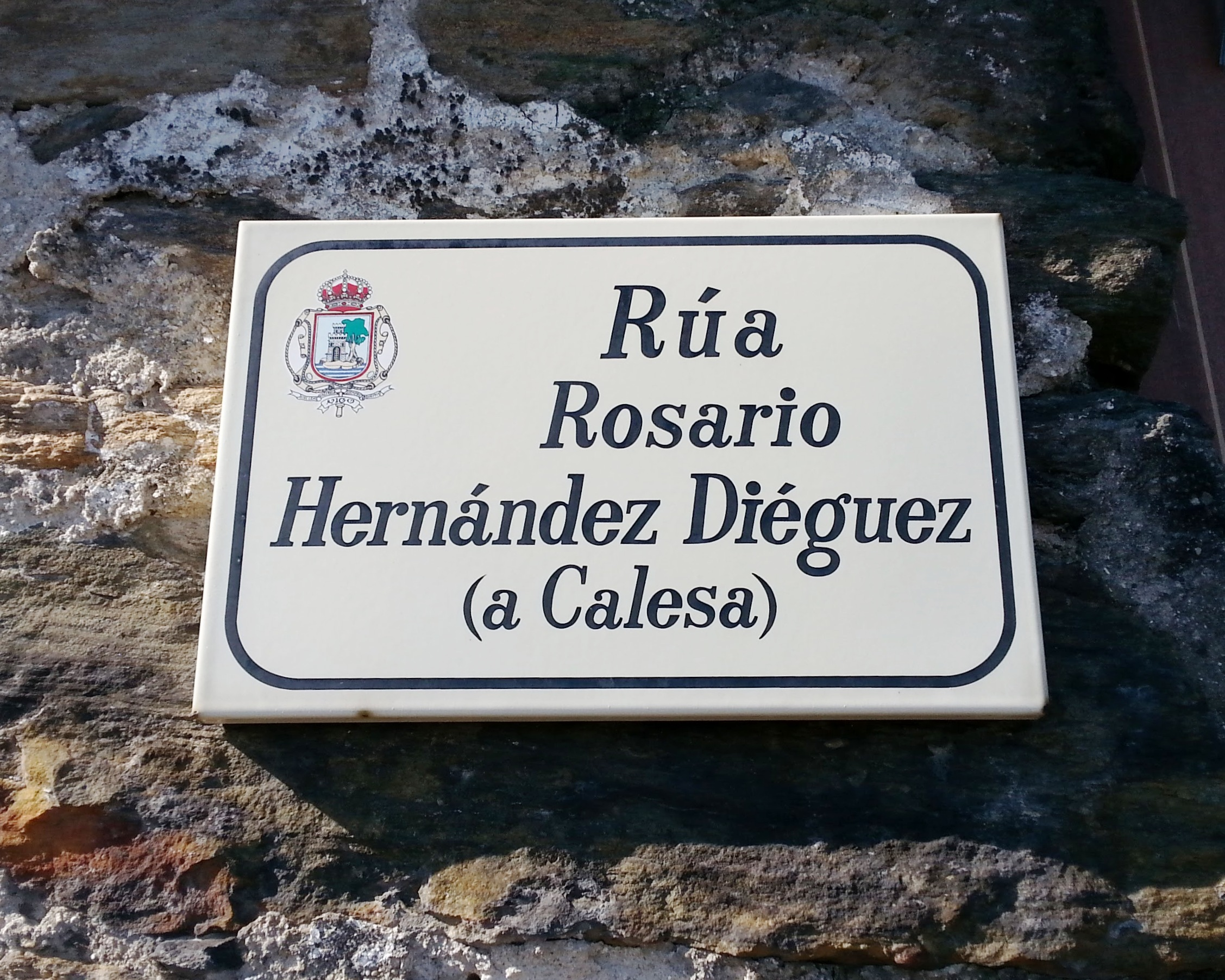 véxase o título e as categorías